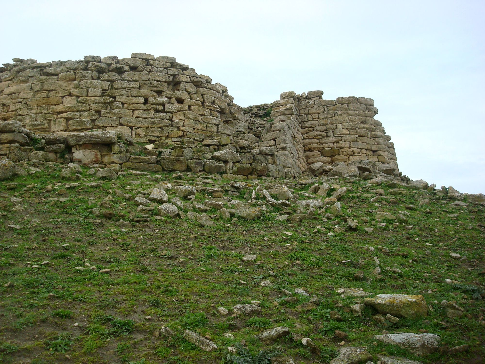 Nuraghe Su Mulinu a Villanovafranca.